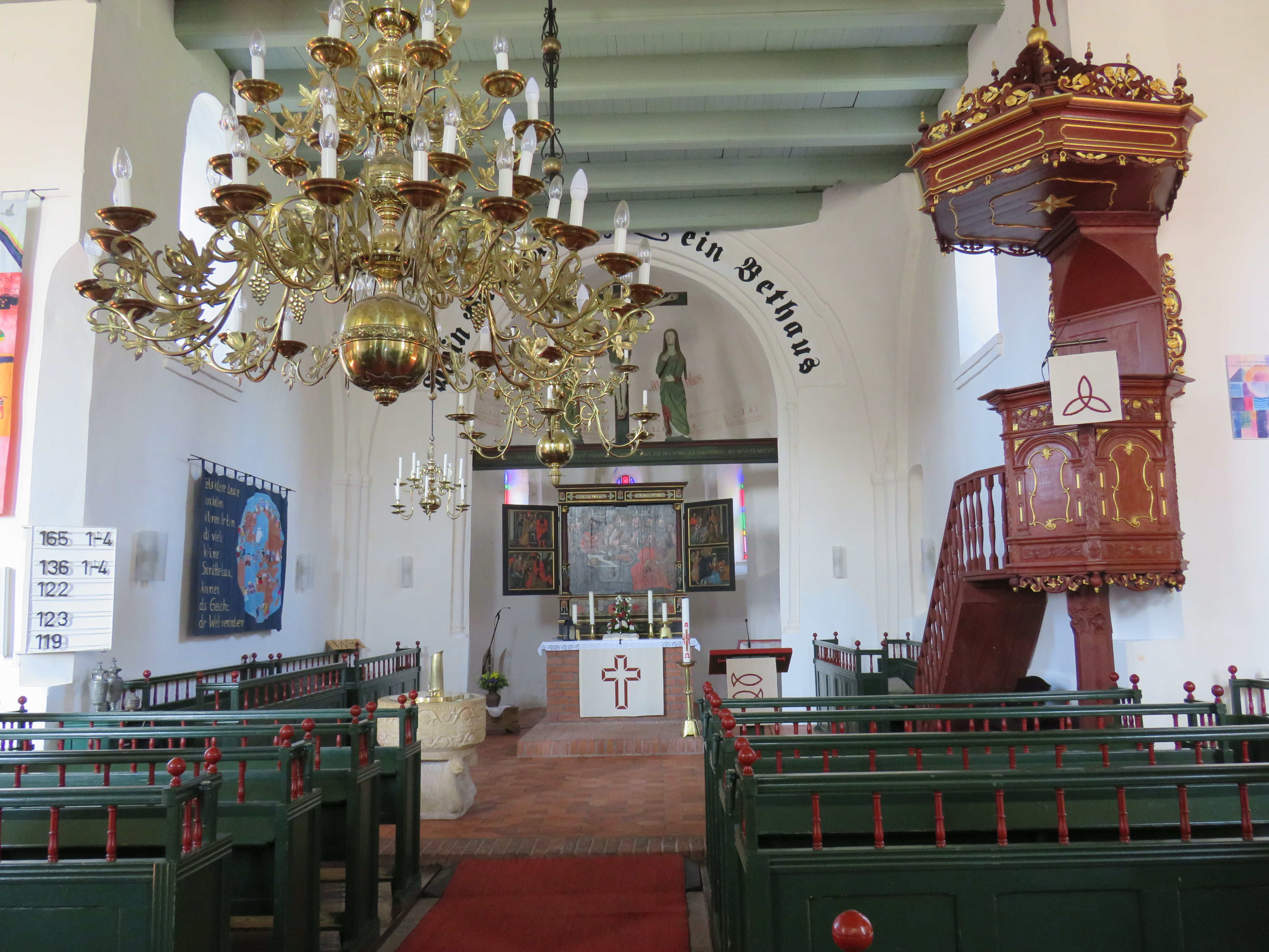 Barbara-Kirche (Strackholt) innen 1